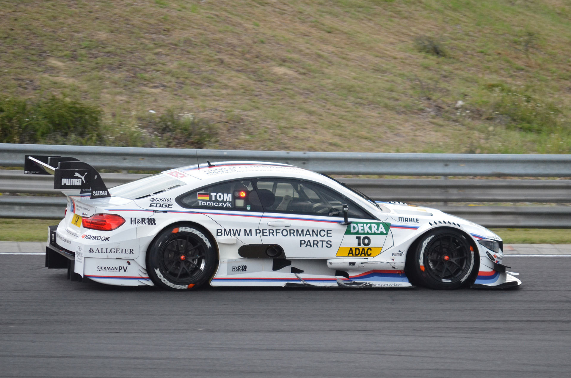 Martin Tomczyk a DTM 2014-es magyar futamán.